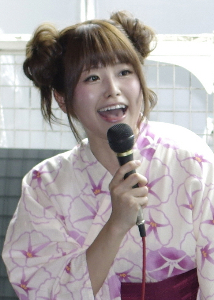 TSUKUMO eX. Windows 10 DSP版発売記念イベント 山下まみ